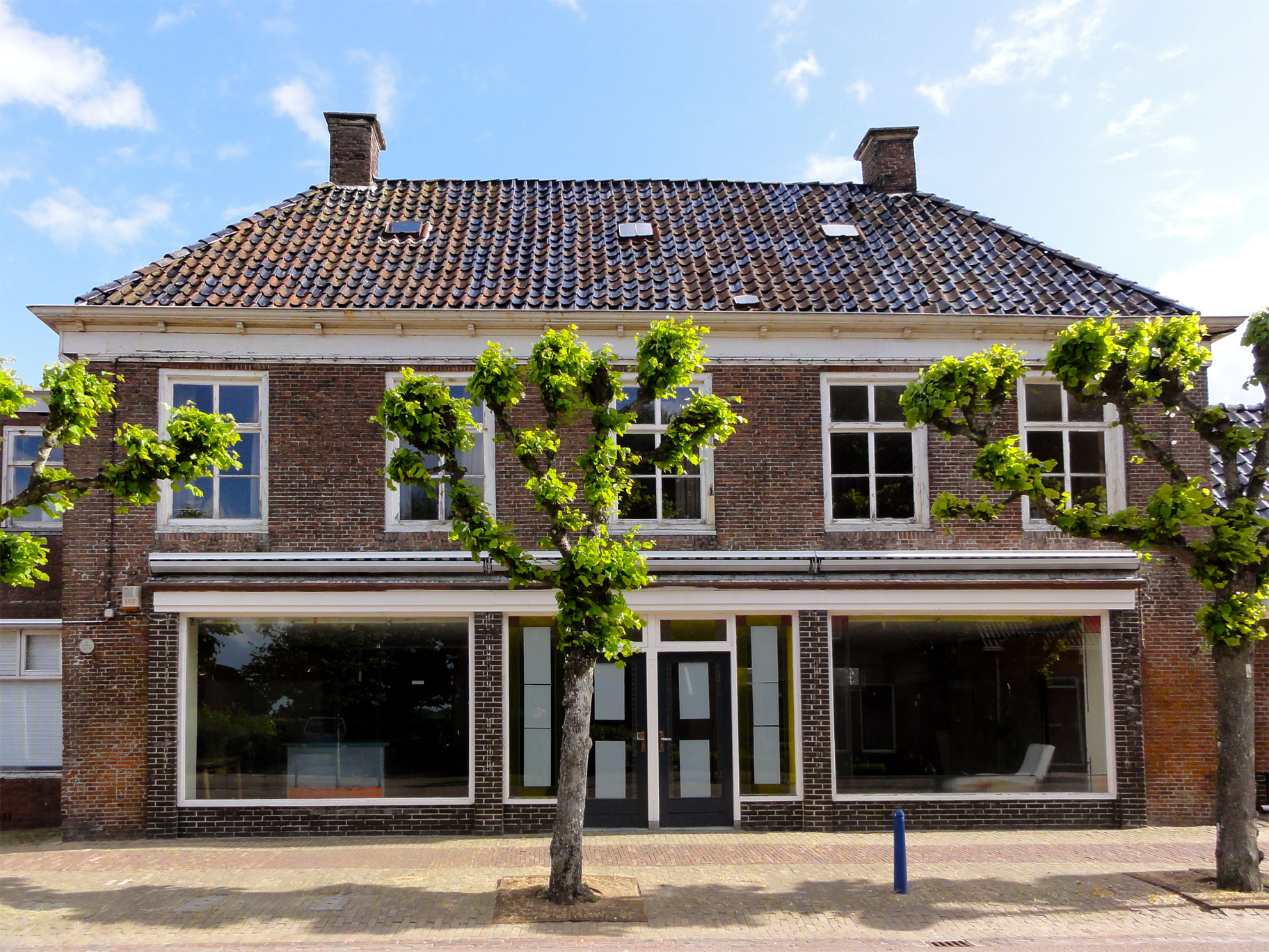 Voorstraat 14 in Blija